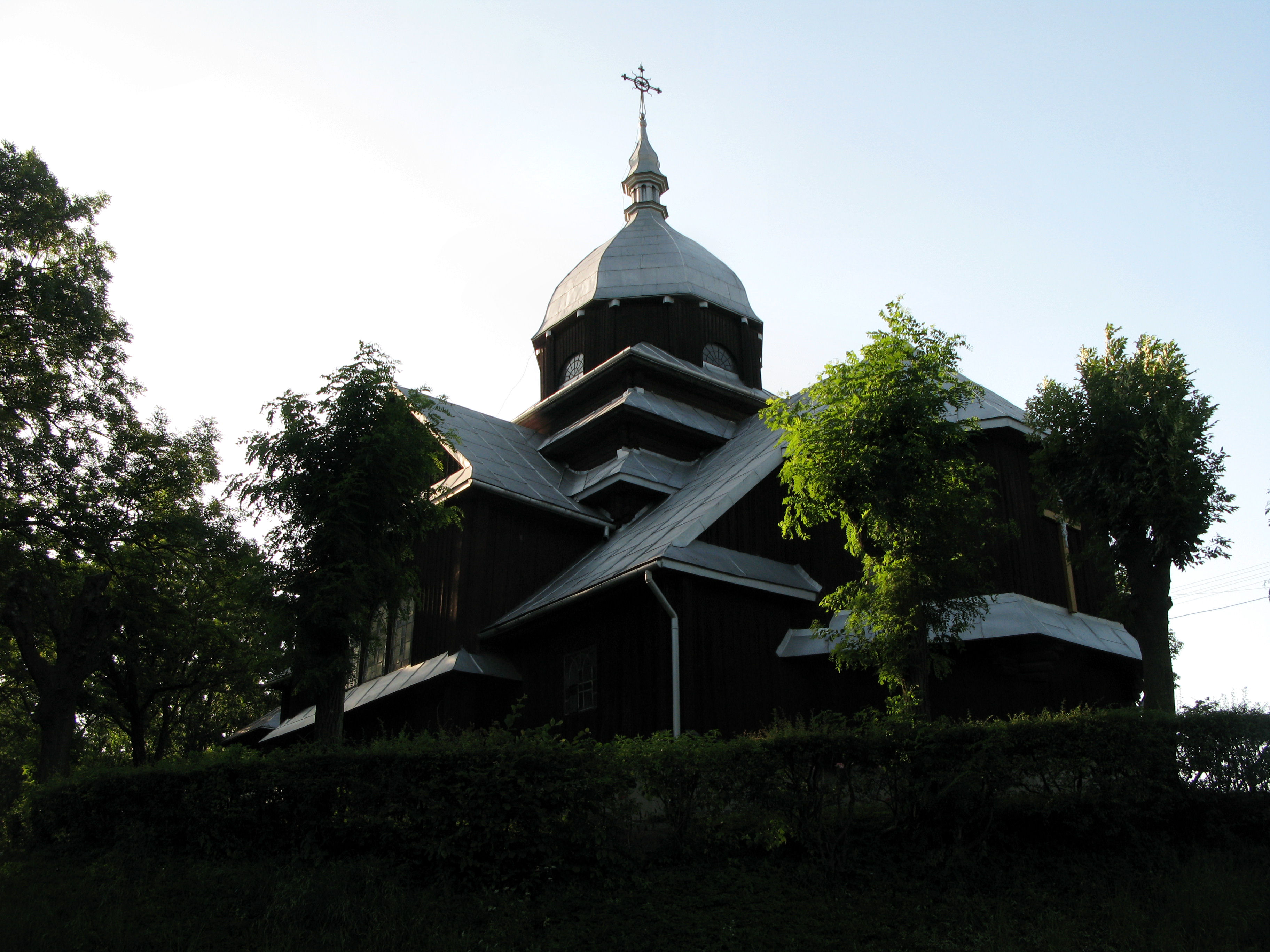 zespół cerkwi greckokatolickiej, ob. kościół rzymskokatolicki parafialny pw. Narodzenia NMP cerkiew greckokatolicka, ob. kościół rzymskokatolicki parafialny pw. Narodzenia NMP dzwonnica przy cerkwi greckokatolickiej, ob. kościele rzymskokatolickim parafialnym pw. Narodzenia NMP cmentarz przy cerkwi greckokatolickiej, ob. kościele rzymskokatolickim parafialnym pw. Narodzenia NMP Fredropol